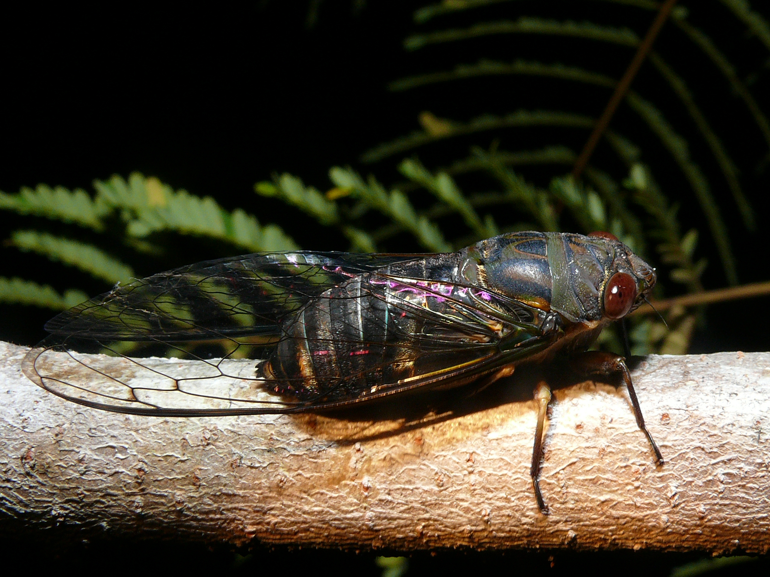 Similajau NP, Sarawak, MALAYSIA